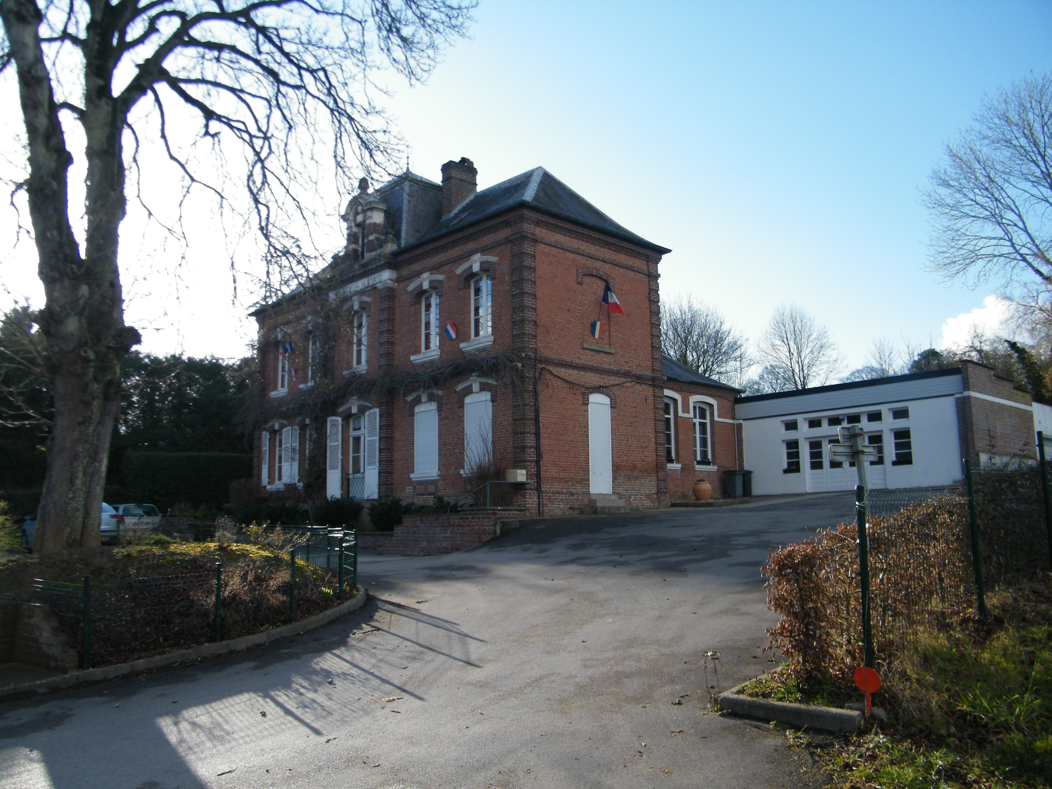 Bâtiments communaux : mairie, ancienne école.